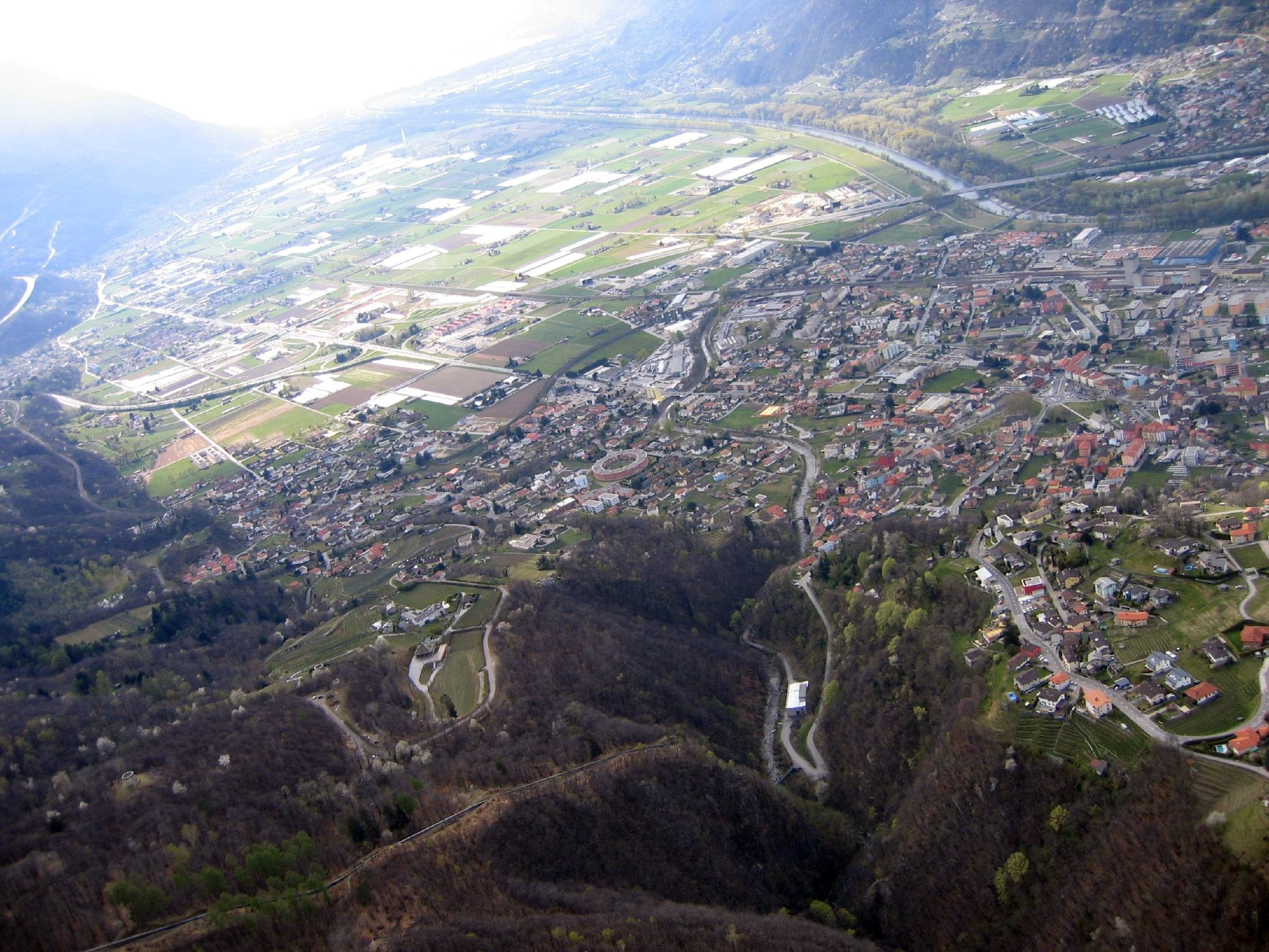 Camorino, Ticino